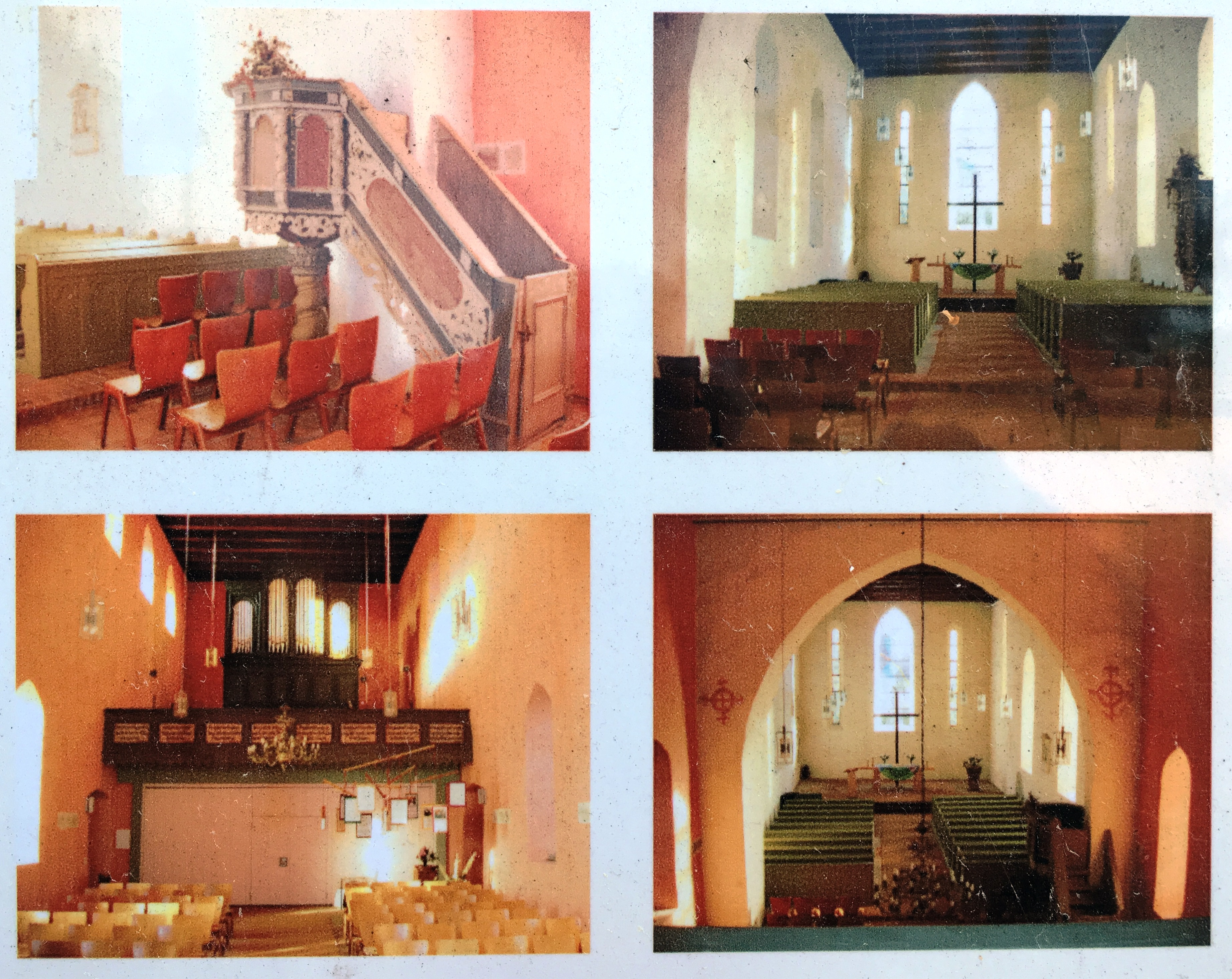 Die Dorfkirche Falkenhagen wurde in der ersten Hälfte des 14. Jahrhunderts als Basilika mit einem dreischiffigen Langhaus errichtet. 1801 trugen Handwerker die Seitenschiffe ab und schlossen die Arkadenbögen. Zur Ausstattung gehören unter anderem eine Kanzel aus dem Anfang des 18. Jahrhunderts sowie eine hölzerne Fünte aus der ersten Hälfte des 17. Jahrhunderts.